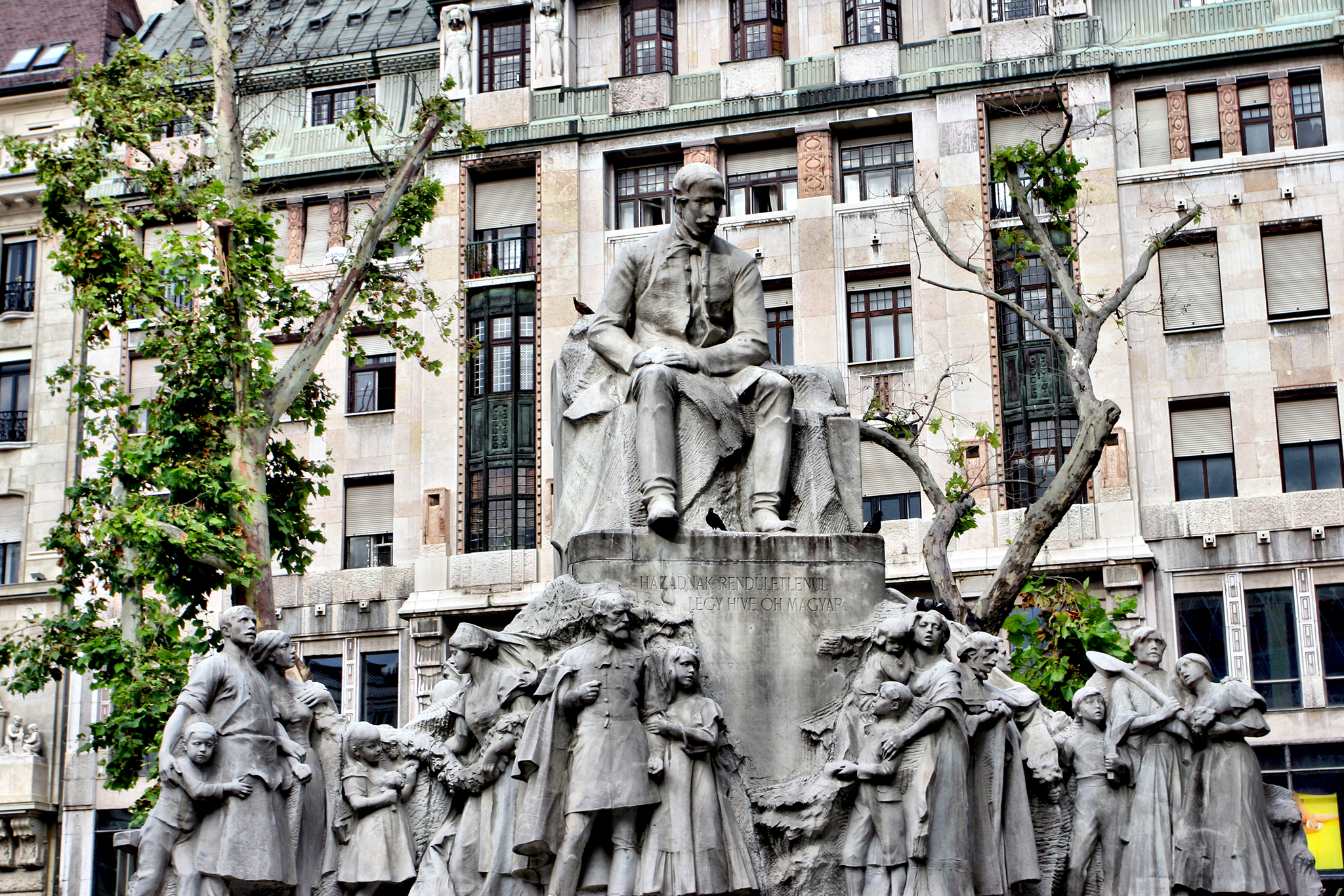 Estatua del poeta Mihály Vörösmarty, en Budapest (Hungría), realizada por los escultores Ede Kallós y Ede Telcs en 1908.